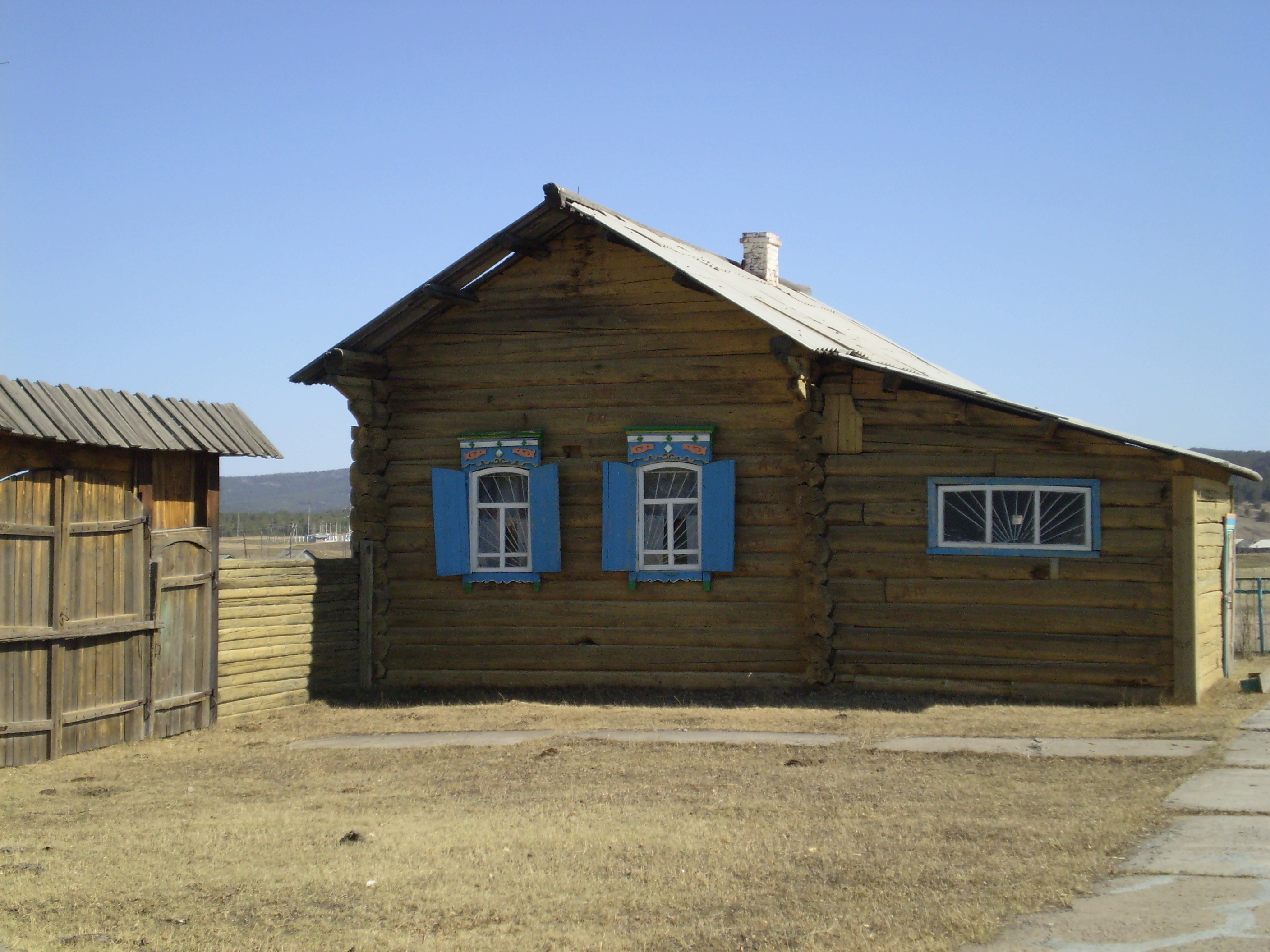 Дом-музей И. К. Калашникова в селе Шаралдай Мухоршибирского района Бурятии.